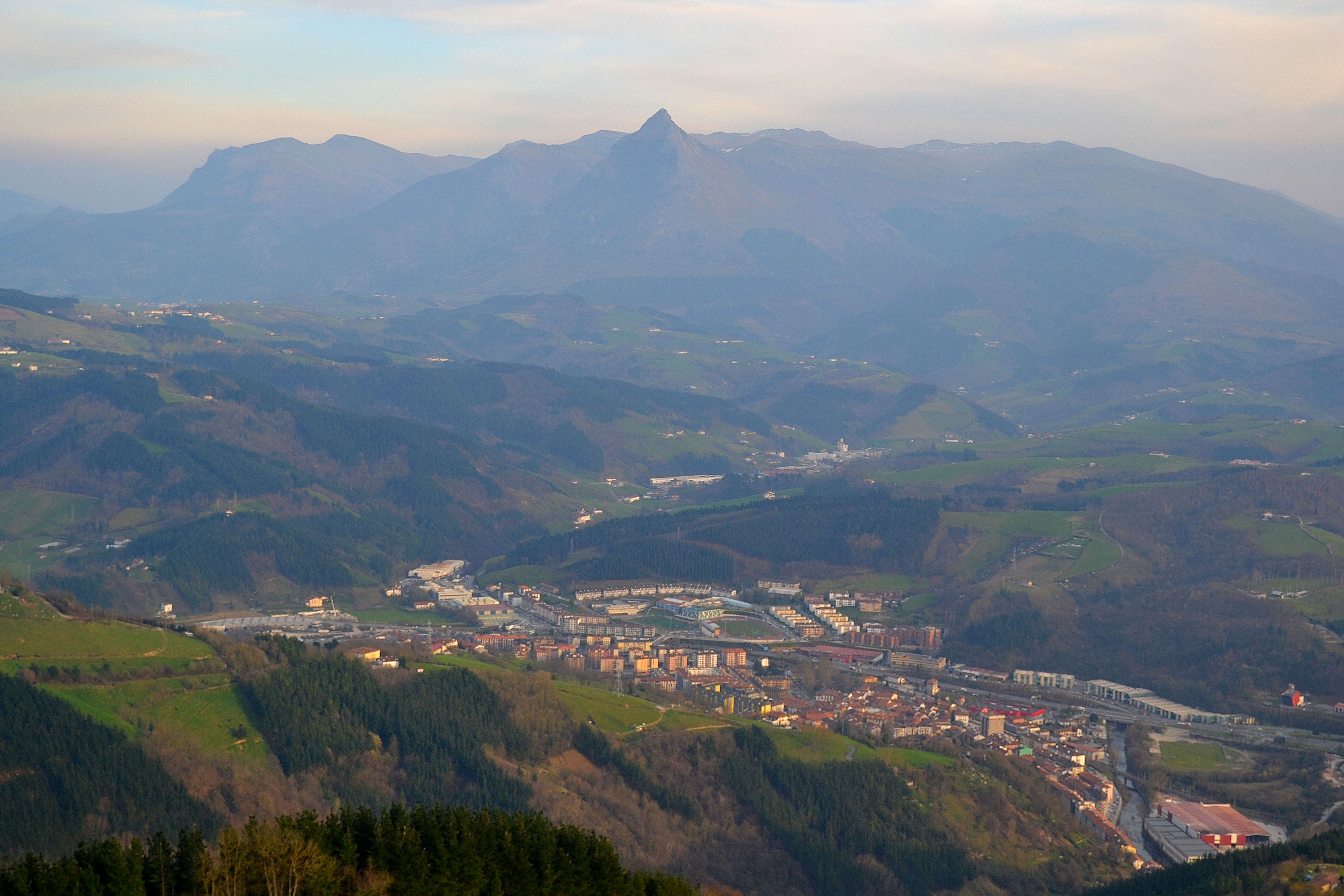 Ordizia eta Txindoki mendia. Gipuzkoa, Euskal Herria. Ordizia and Txindoki mountain. Gipuzkoa, Basque Country.